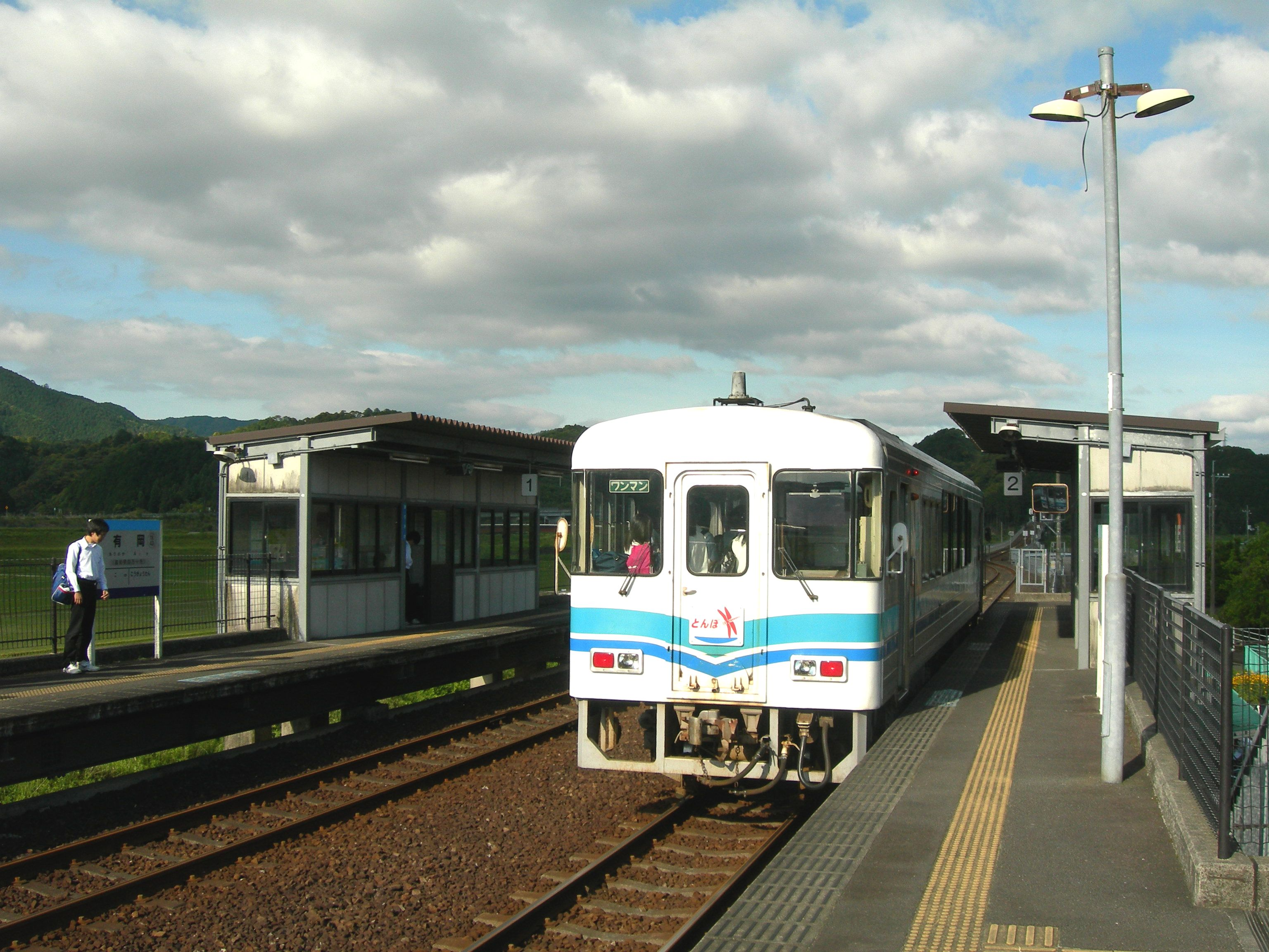 有岡駅ホーム